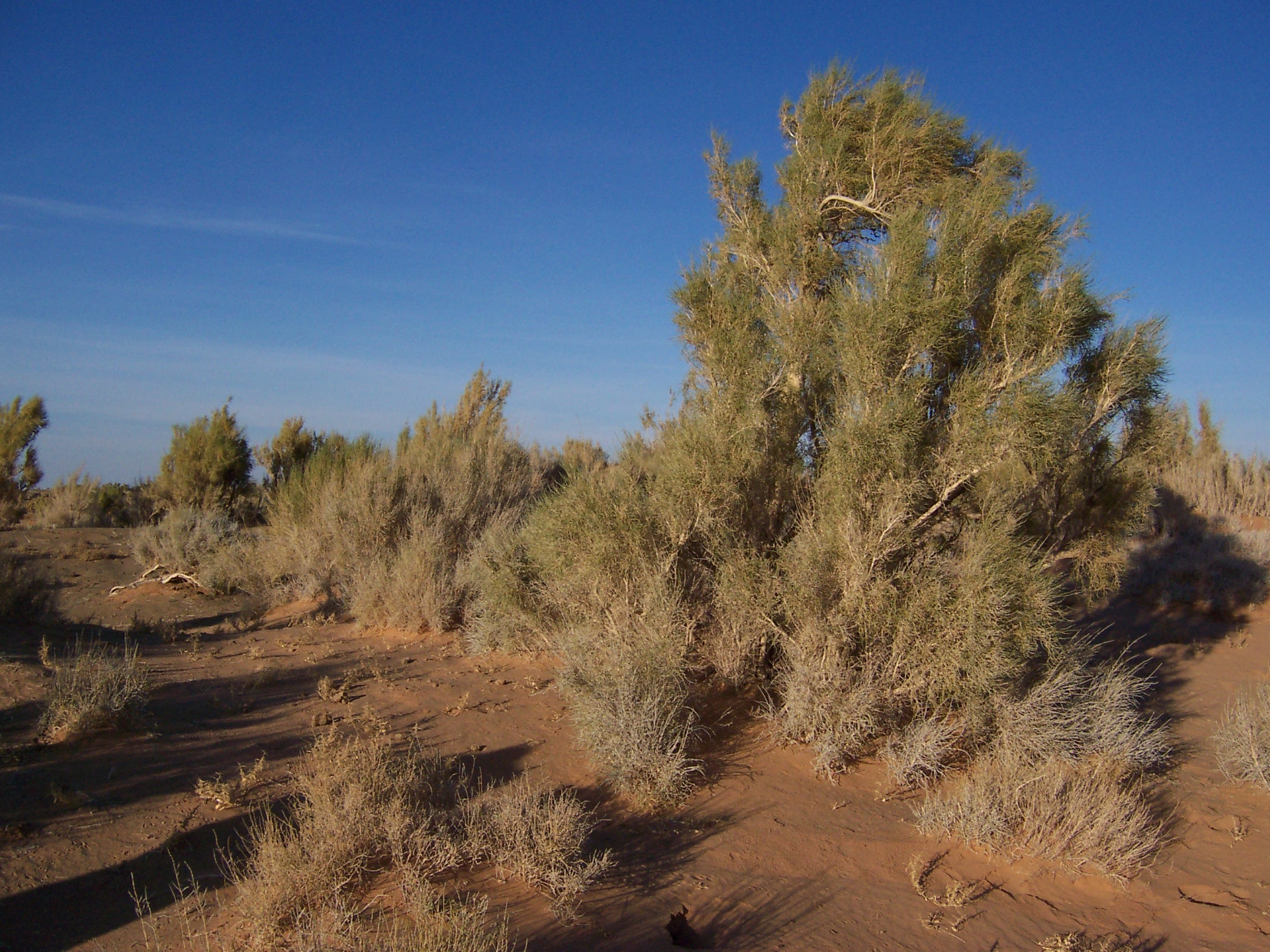 Saxaul tree dans le désert de Gobi.